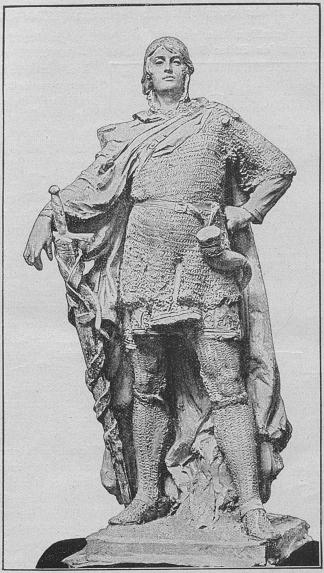 Denkmal Otto I., 2. Markgraf von Brandenburg - Das Denkmal stand in der ehemaligen Siegesallee in Berlin, ausführliche Beschreibung im Beitrag Otto I.